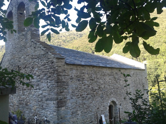 Església romànica de Sant Andreu de Vallestàvia després de la restauració efectuada durant els anys 2010 i 2015.